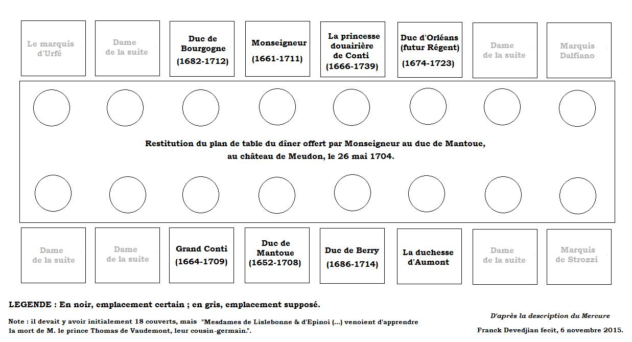 Restitution du plan de table du dîner offert par Monseigneur au duc de Mantoue, le 26 mai 1704, au château de Meudon.